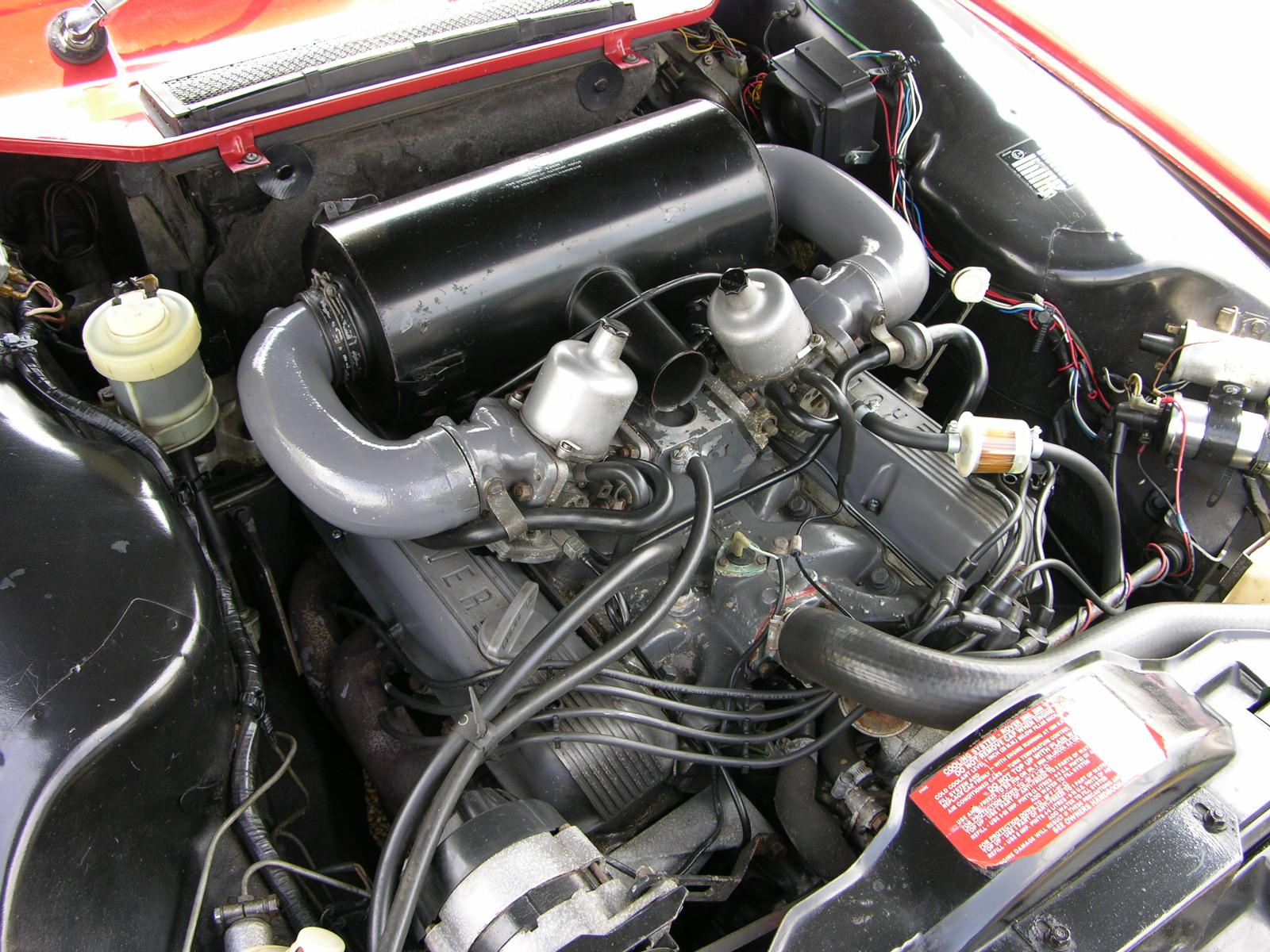 Rover 3500 V8